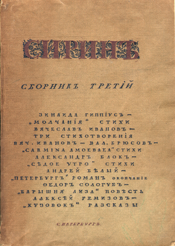 Sirin, the almanac, v. 3, S.-Petersburg, 1913